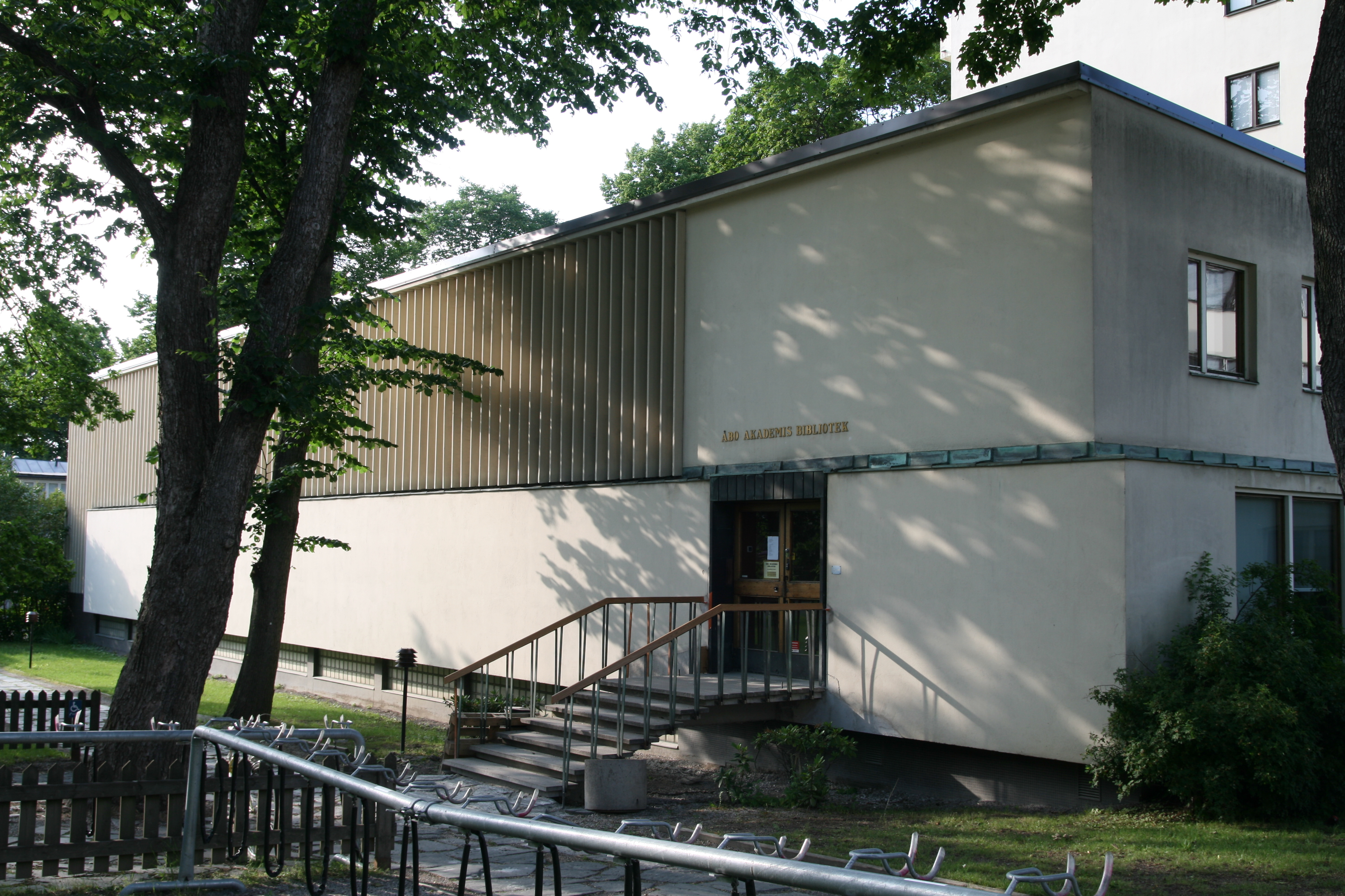 Åbo Akademi's library building phase 2 extension, Woldemar Baeckman/Erik Bryggman